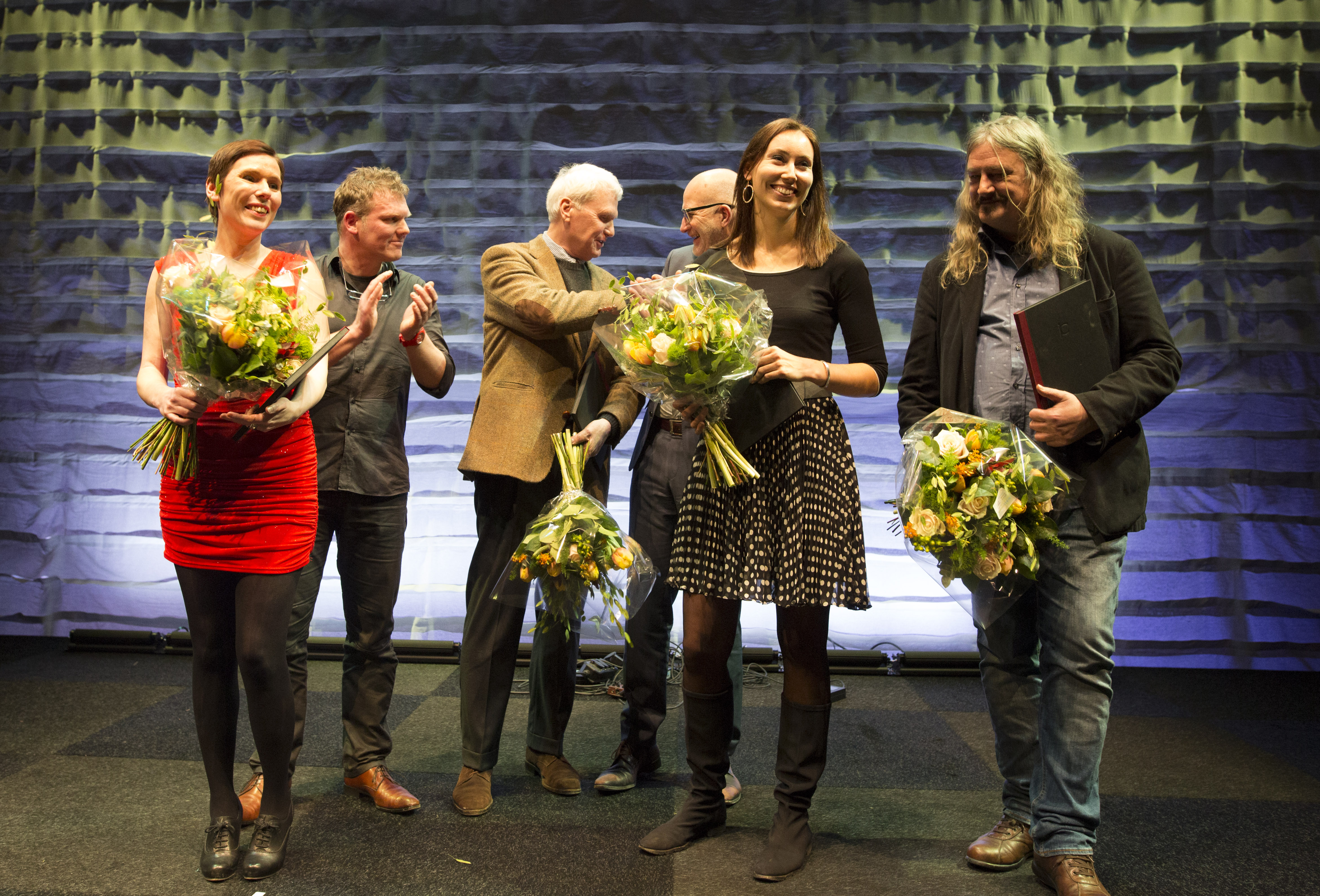 Jan Campertprijzen 2015: V.l.n.r.: Annelies Verbeke, Joris Wijsmuller, Adriaan van Dis, Aad Meinderts, Anna Woltz & Ilja Pfeijffer.Schrijversfeest - Winternachten 2016 Schrijversfeest Theater aan het Spui, Den Haag, Nederland